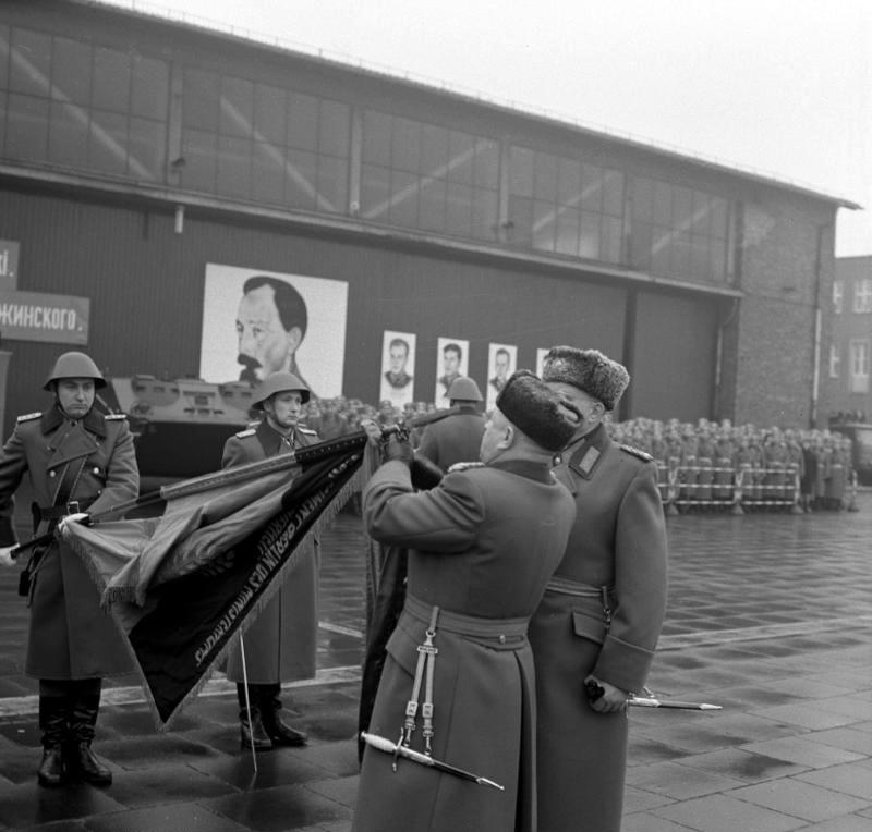 Berlin, Namensverleihung an Wachregiment Zentralbild/ 15.12.1967- Berlin: Namensverleihung an Wachregiment Der Minister für Staatssicherheit, Generaloberst Erich Mielke, verlieh am 15.12.1967 dem Wachregiment Berlin des Ministeriums für Staatssicherheit den Ehrennamen "Feliks Edmundowitsch Dzierzynski". UBz: Der Minister für Staatssicherheit, Generaloberst Erich Mielke (2.v.r.), heftet das Namensband an die Truppenfahne des Wachregiments Berlin. Abgebildete Personen: Mielke, Erich: Minister für Staatssicherheit, Armeegeneral, Politbüro des Zentralkomitees (ZK) der SED, DDR (GND 118977490)